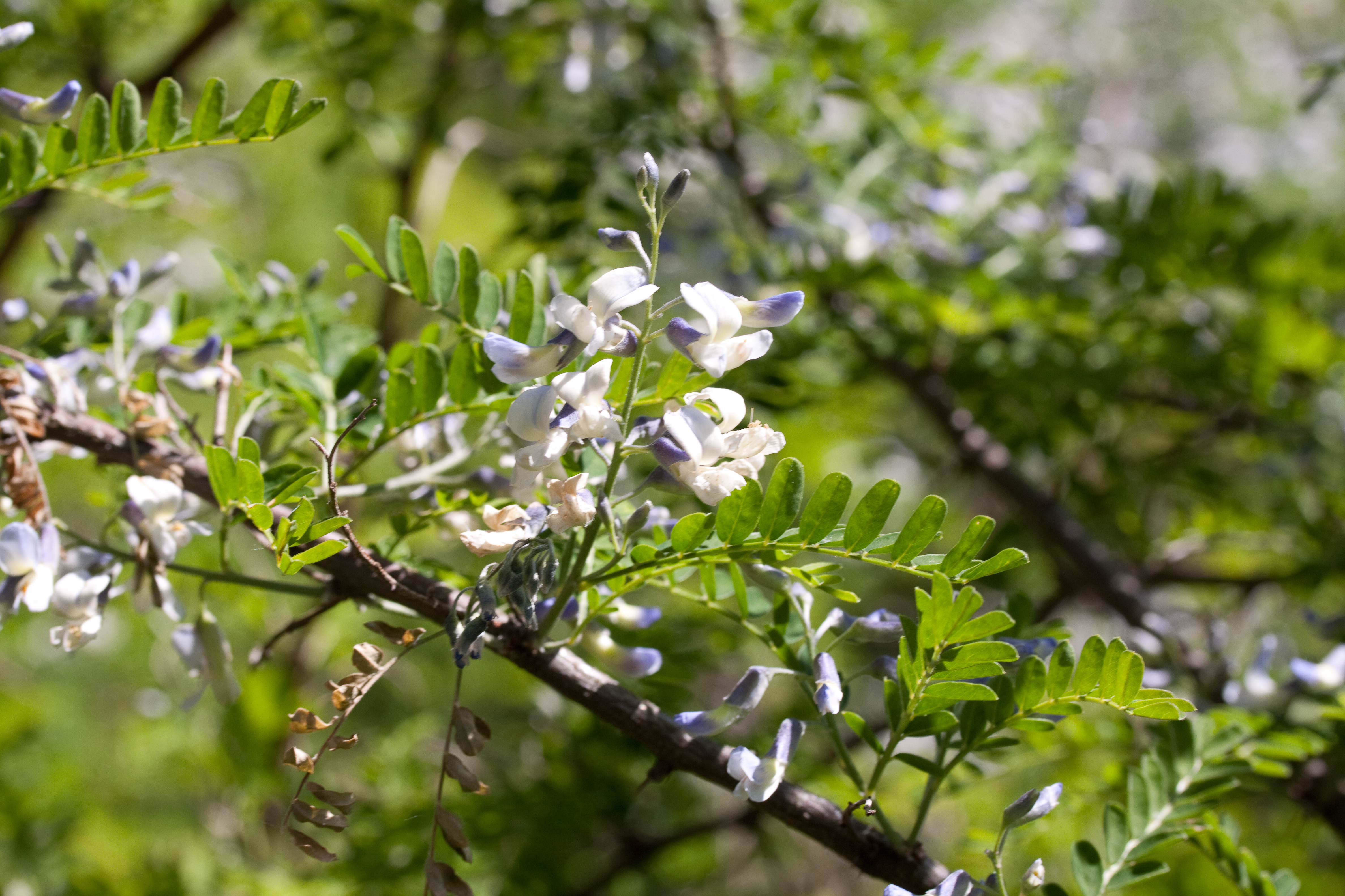 Sophora davidii (Franch.) Skeels - Floraison - Jardin botanique de Strasbourg - France